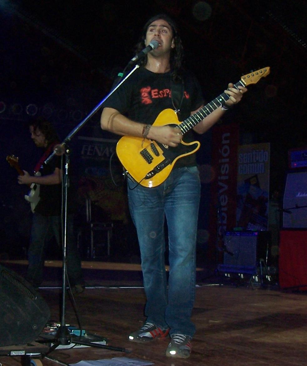 La Mancha de Rolando en la 28º edición de la Fiesta Nacional del Inmigrante, en Oberá, Argentina.